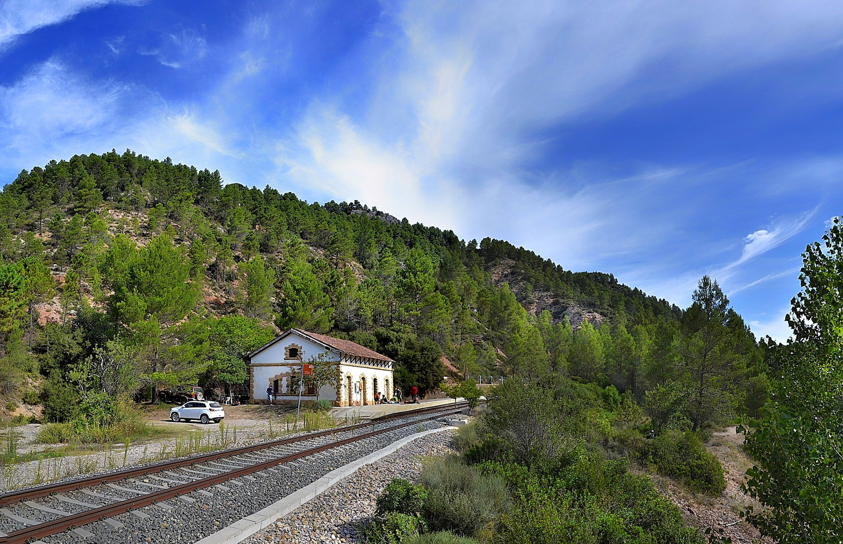 Línea ferroviaria Lleida-La Pobla de Segur (Estación de Vilanova de la Sal)